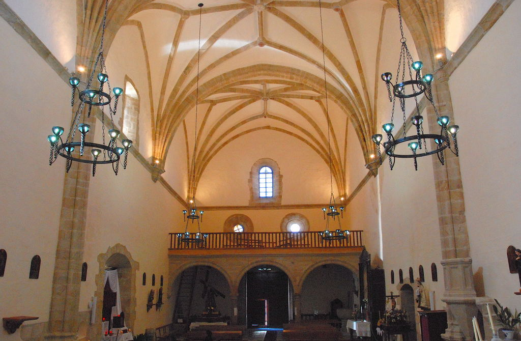 Iglesia de Saucedilla, sigl. XVI (Cáceres), nave